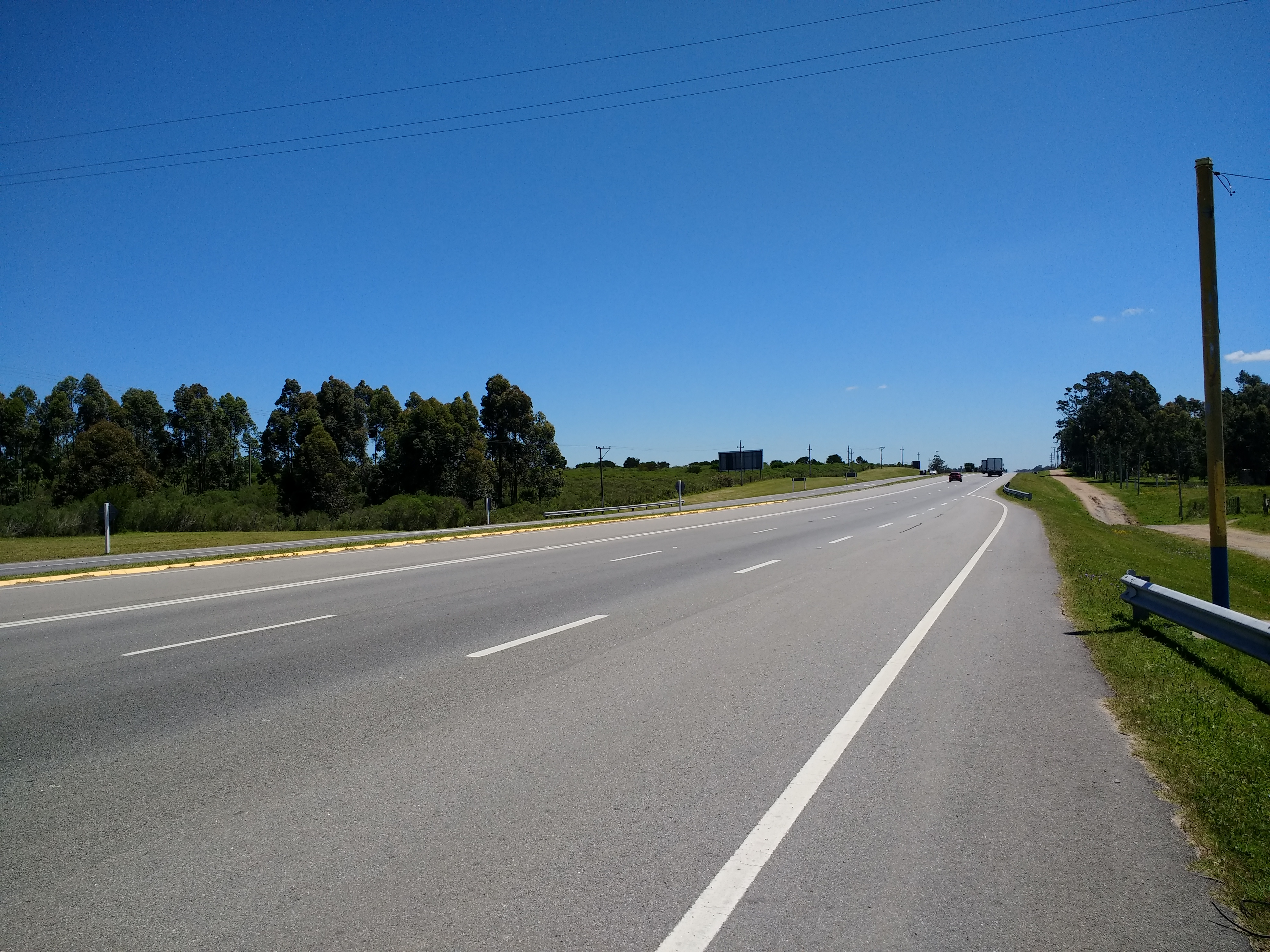 Ruta Interbalnearia de Uruguay, cerca de Costa Azul.